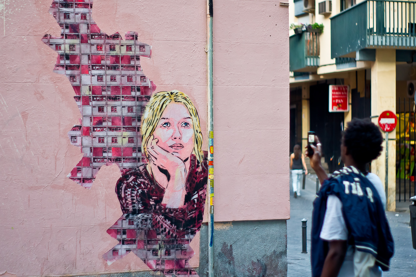 Esquina calle Jesús y María con calle Lavapiés, Madrid, España.